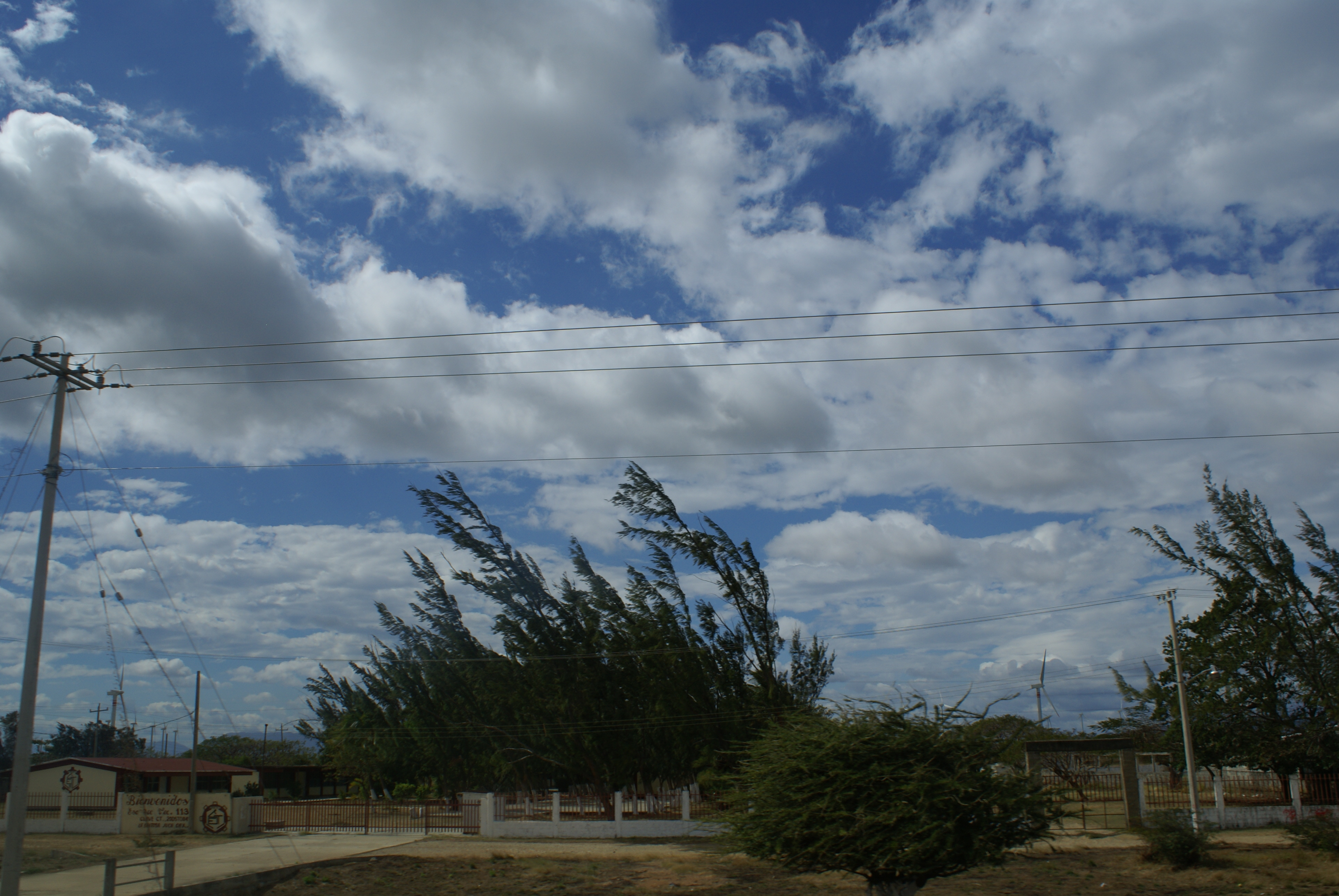 Efecto de los fuertes vientos que se generan en la localidad. En primer plano árboles de la Escuela Secundaria 113.